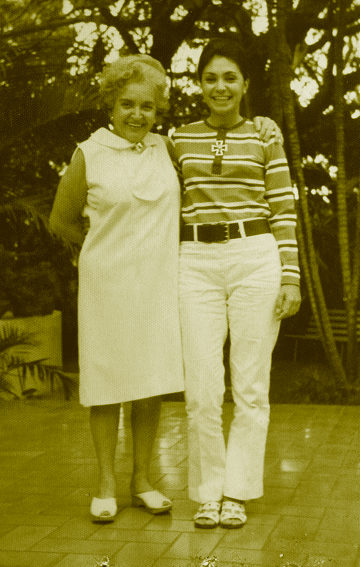 Conny Mendez y Katiusca C.